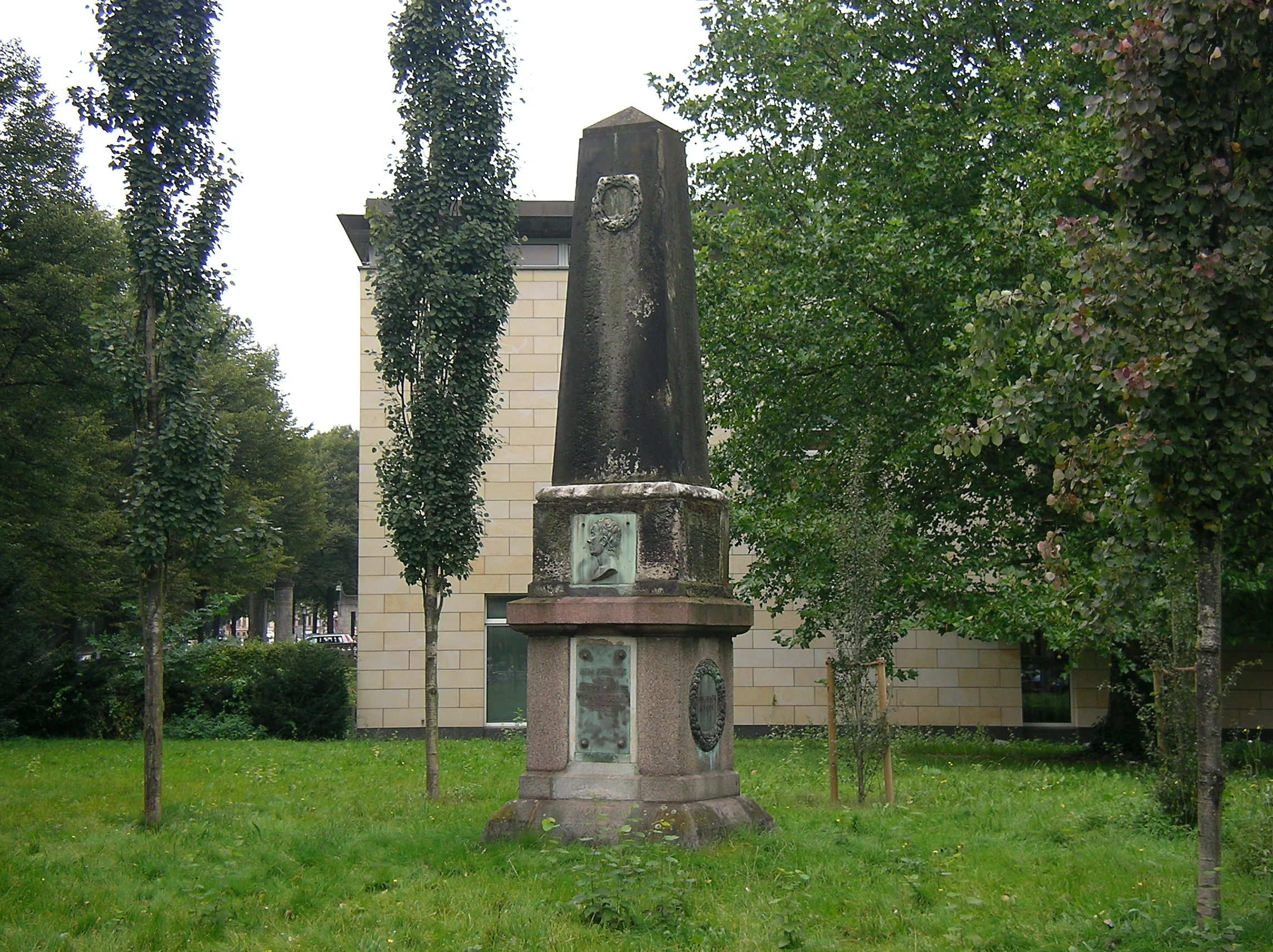 Das Büsch-Denkmal 2007 This is a photograph of an architectural monument.